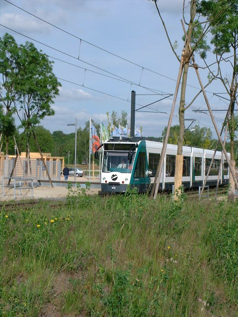 Niederflurstraßenbahn vom Typ „Combino“ auf der Trasse entlang des Volksparks Bornstedt